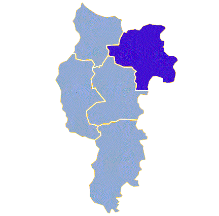 Powiat słubicki - Gmina Ośno Lubuskie